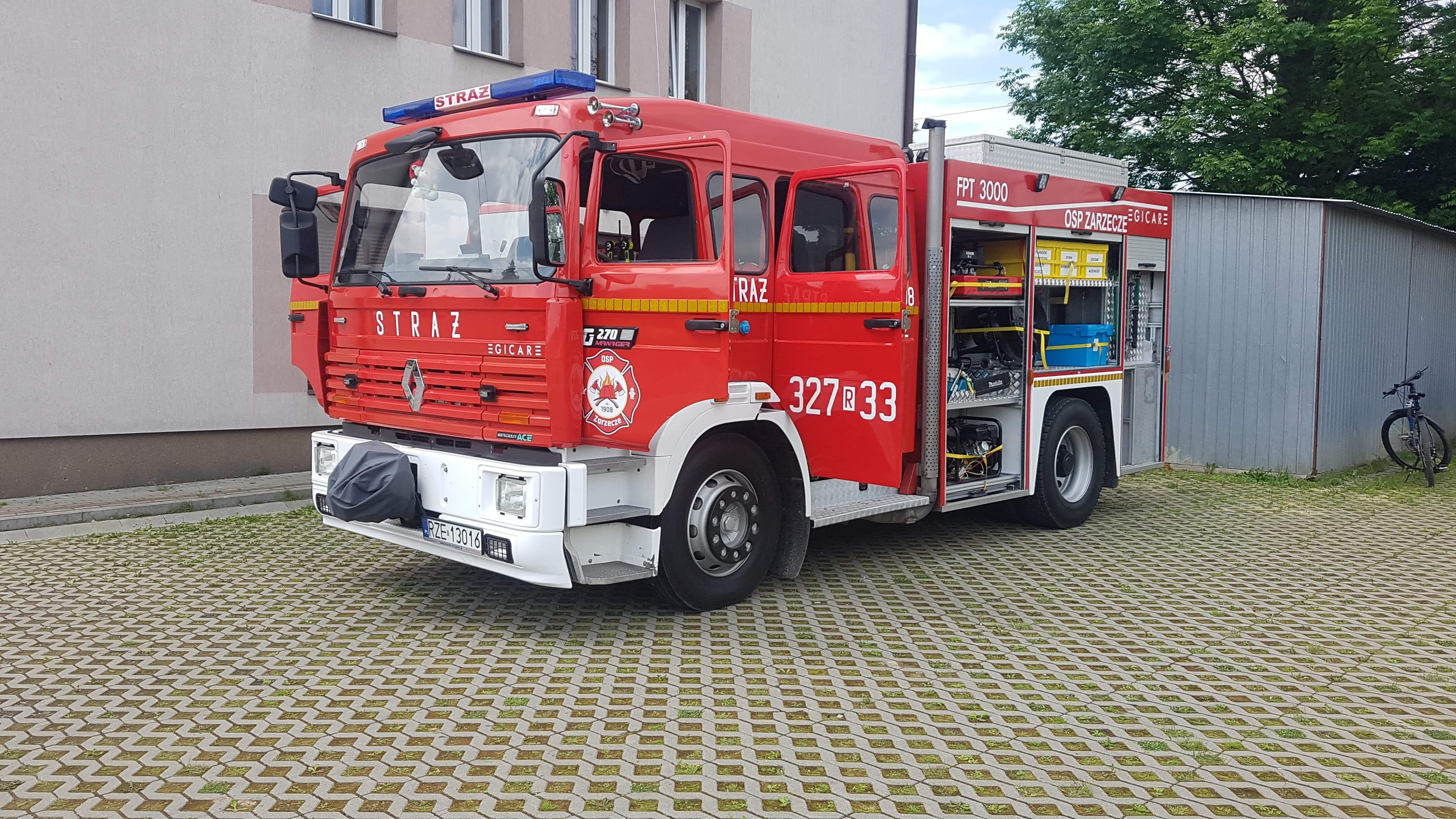 Ciężki samochód ratowniczo-gaśniczy Renault g270 Manager należący do Osp Zarzecze